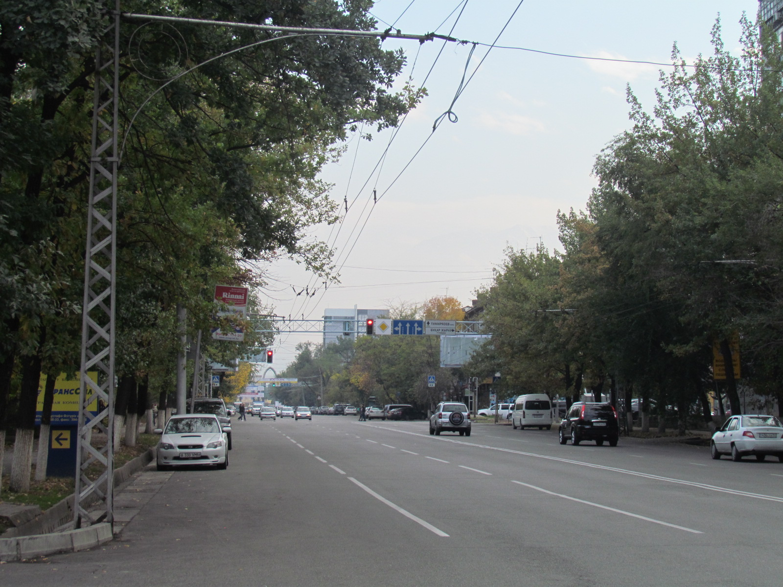 Улица Ауэзова (Алма-Ата, Казахстан), вид в направлении на юг от перекрестка с улицей Мустафы Озтюрка. 5 октября 2014 года